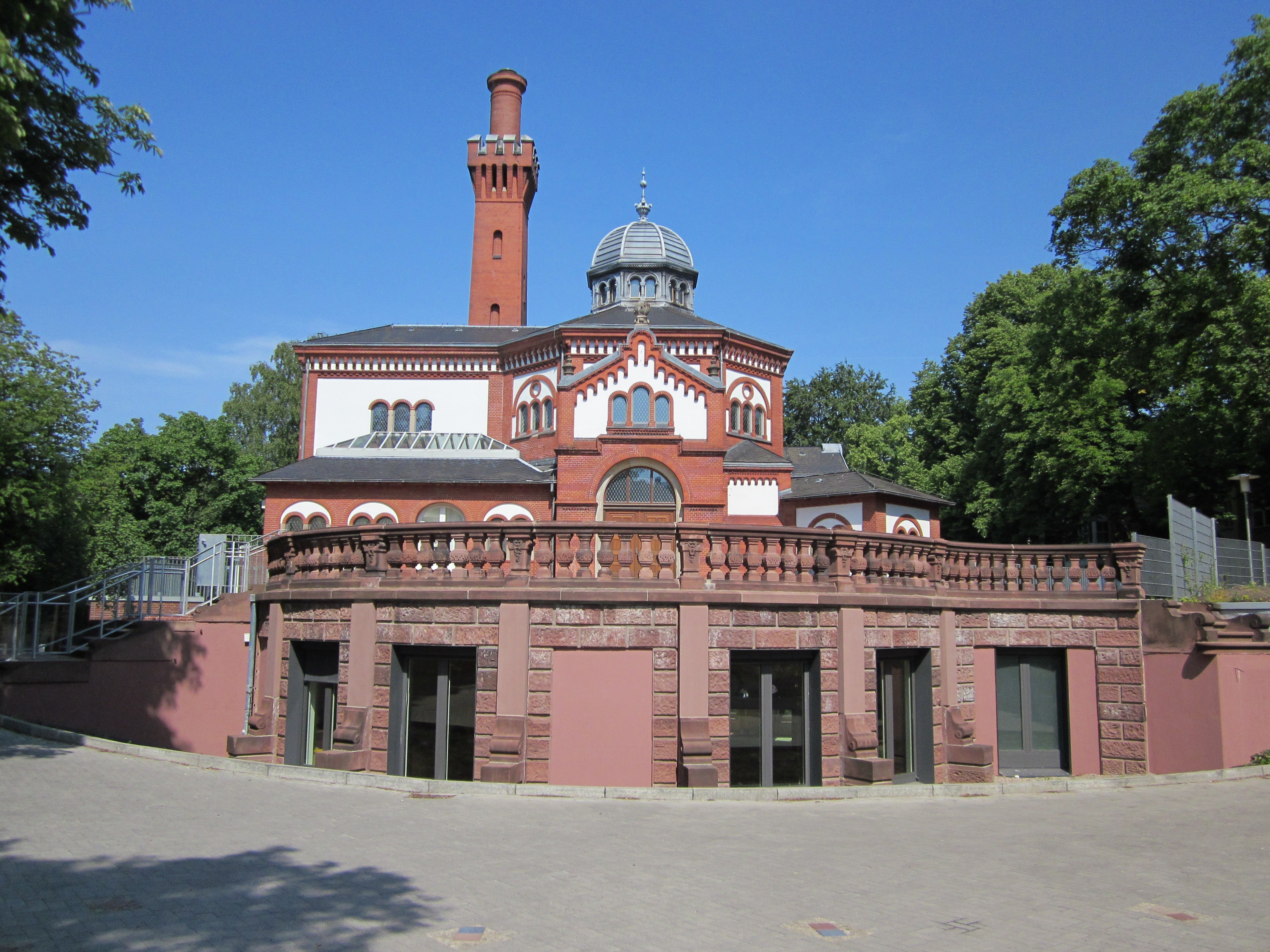 Das Alte Krematorium in der Alsterdorfer Straße 523 in Alsterdorf wurde 1890/91 nach Plänen von Ernst Paul Dorn durch den Hamburg-Altonaer Verein für Feuerbestattung erbaut. Es war bis zur Errichtung des neuen Krematoriums auf dem Hauptfriedhof Ohlsdorf 1933 in Betrieb. Heute ist dort die private Flachsland Zukunftsschule untergebracht. This is a photograph of an architectural monument.